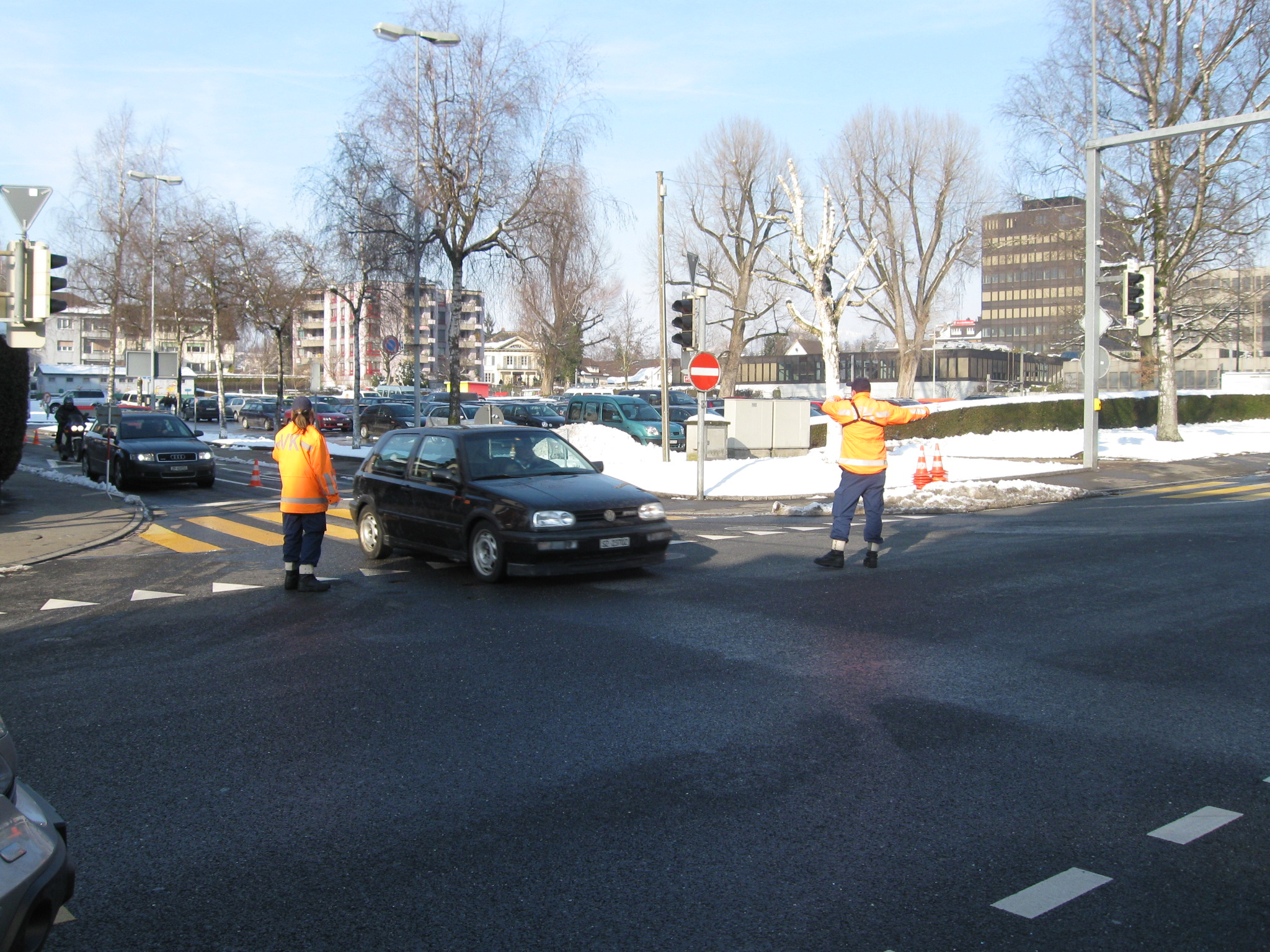 Zwei Verkehrskadetten regeln den Verkehr auf einer stark befahrenen Kreuzung